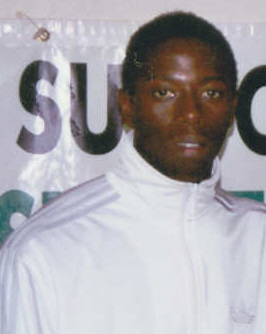 Photo du joueur de football Mouhamadou Dabo lors de la saison 2005-2006. Cette photo à été prise par Mickaël Roure alias Altrensa pour Wikipédia. Elle ne saurait être utilisée sans la mention de son auteur. D'avance merci.